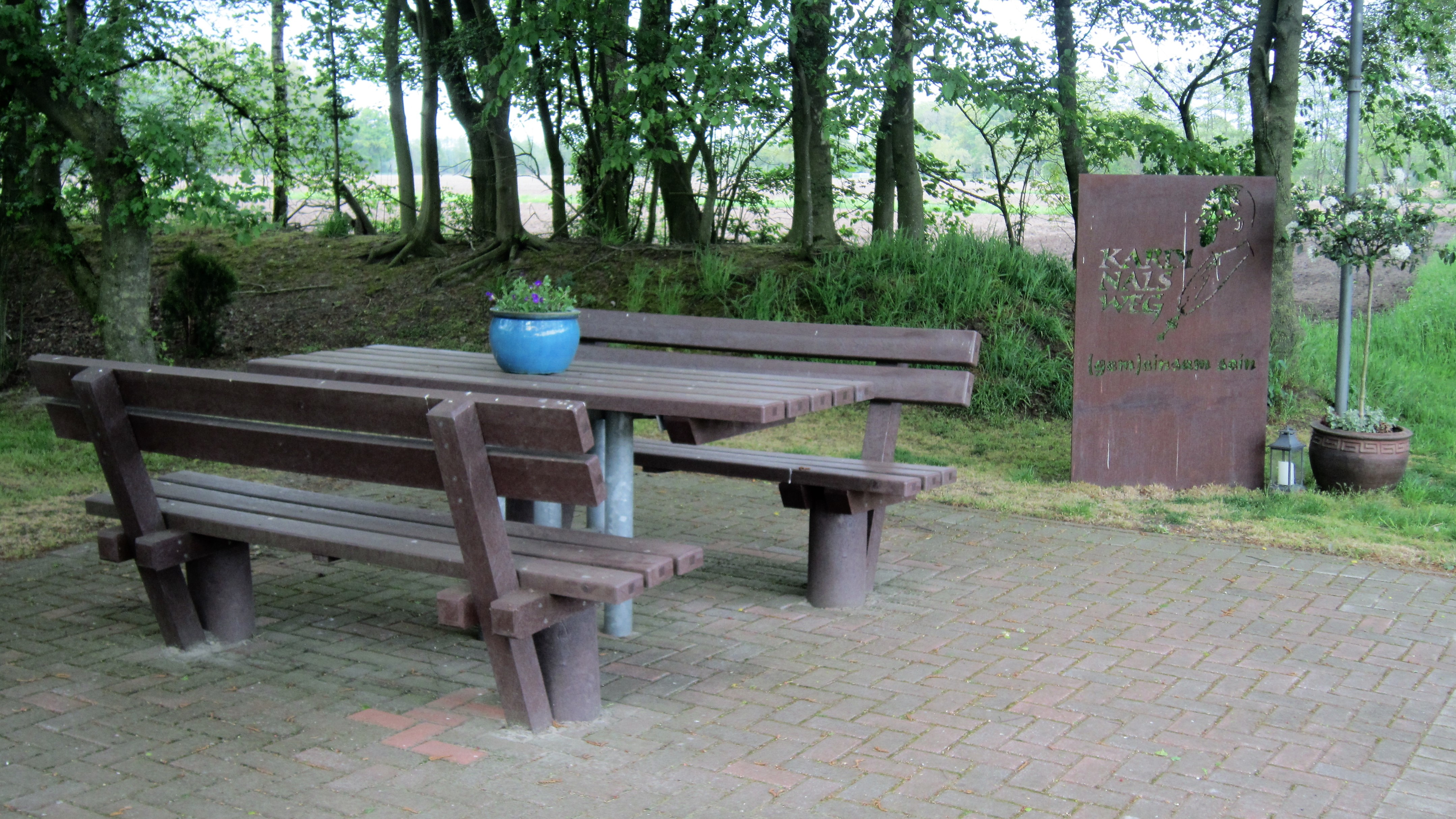 Stele mit der Inschrift "(gem)einsam sein" in der Dinklager Bauerschaft Langwege. Die Stele ist an Station 4 des Kardinalswegs aufgestellt, eines 24,1 km langen Pilgerwegs, der zum Gedenken an den seliggesprochenen Kardinal im Oktober 2018 eingeweiht wurde. Der Weg führt durch den Landkreis Vechta (Niedersachsen) vom ehemaligen Priorat St. Benedikt (heute Hotel Kloster Damme) über Holdorf zur Burg Dinklage, dem Geburtsort Kardinal von Galens.